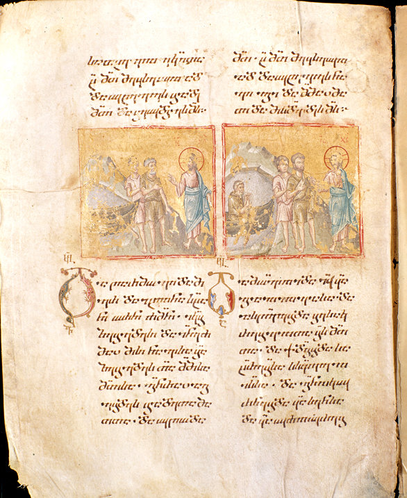 მოქვის სახარების ერთ-ერთი გვერდი